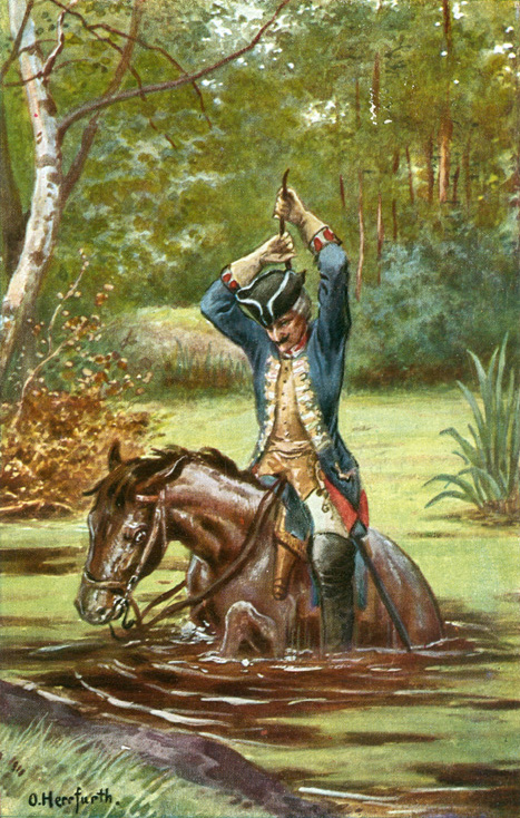 Münchhausens Abenteuer. Postkartenserie nach den Lügengeschichten des Baron Münchhausen. Serie der Firma UVACHROM (Verlag Farbenphotographische Gesellschaft m.b.H., Stuttgart) in zwei Folgen von je sechs Postkarten. Folge I: Serie 324. Nr. 4912–4917. Folge II: Unknown Text der Rückseite: Auf einem anderen Kriegszug wollte Münchhausen über einen Sumpf reiten, geriet aber so tief hinein, dass er hätte umkommen müssen. Durch die Stärke seines eigenen Armes zog er sich am Haarzopf und das Tier, eingeklemmt zwischen die Knie, aus dem Morast heraus.